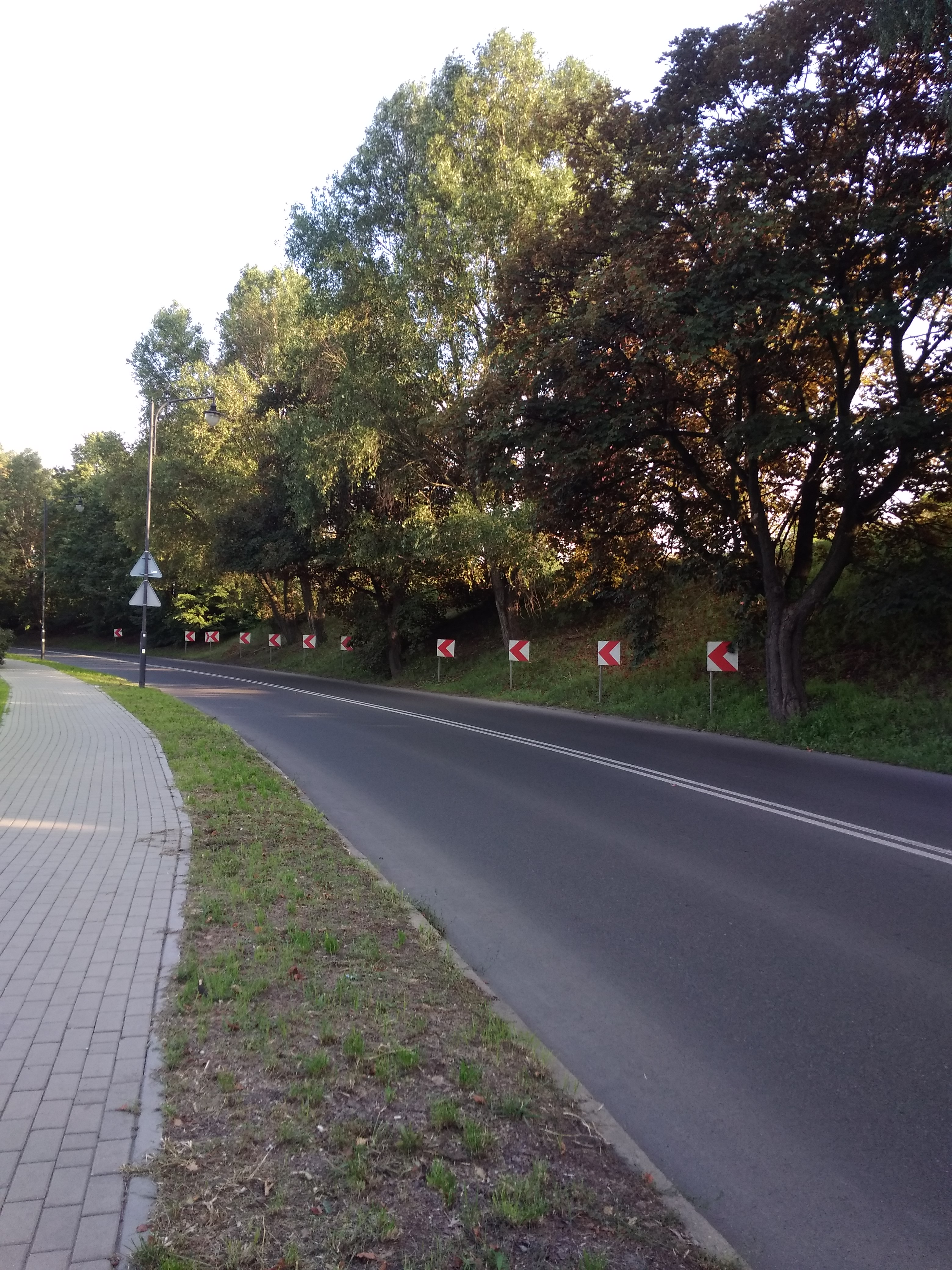 ulica Michałkowicka w Siemianowicach Śląskich